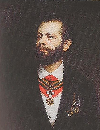 Porträt von Hugo Franz Ritter von Brachelli (1834–1892), Rektor der Technische Hochschule Wien